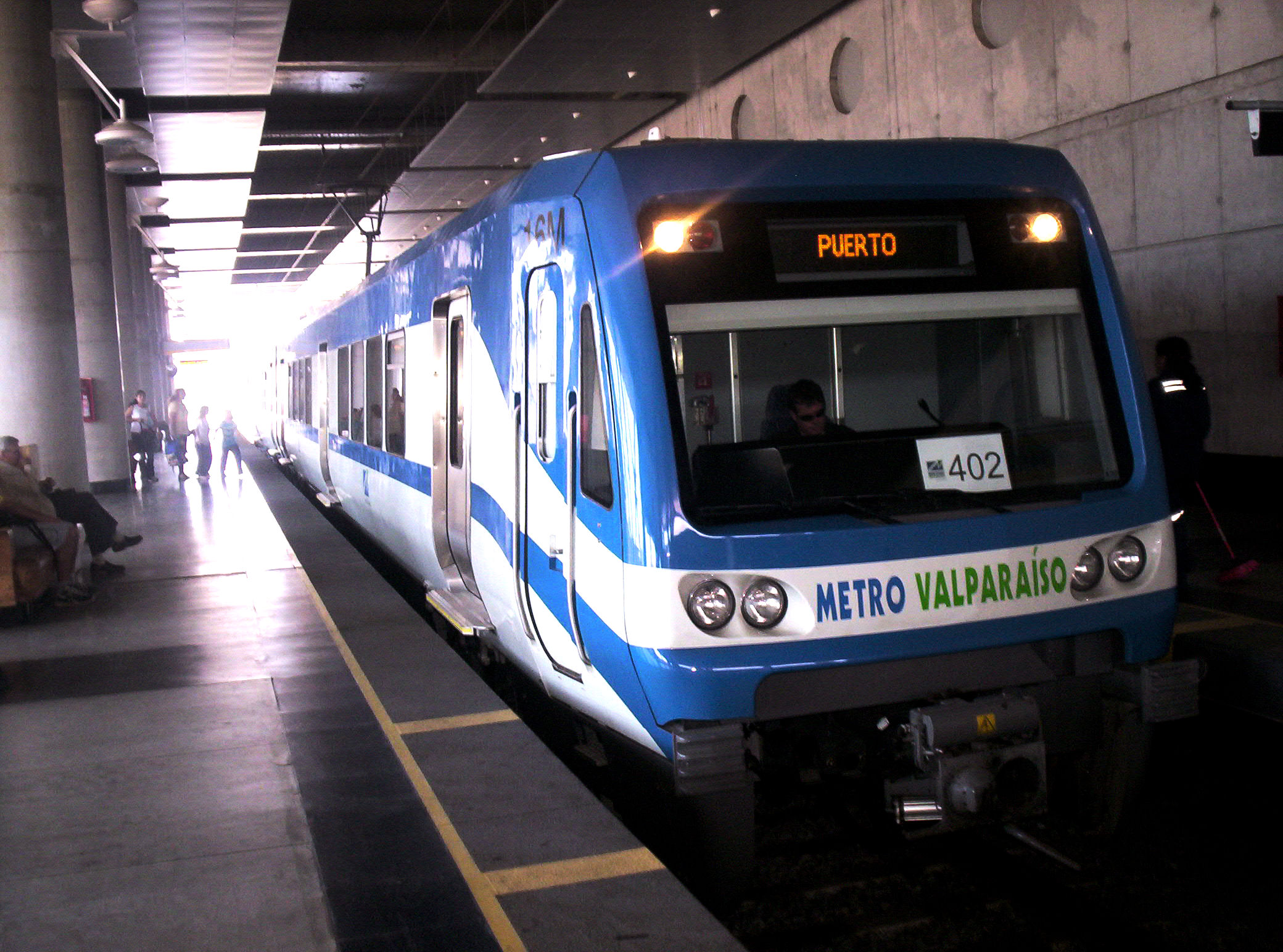 El autor de la imagen es José Cuevas Sepúlveda, que las cede a Der schöne Tod mediante autorización Wikipedia:Autorización para insertar material de Josephs con Copyright y en el about de sus fotolog [1] y [2]